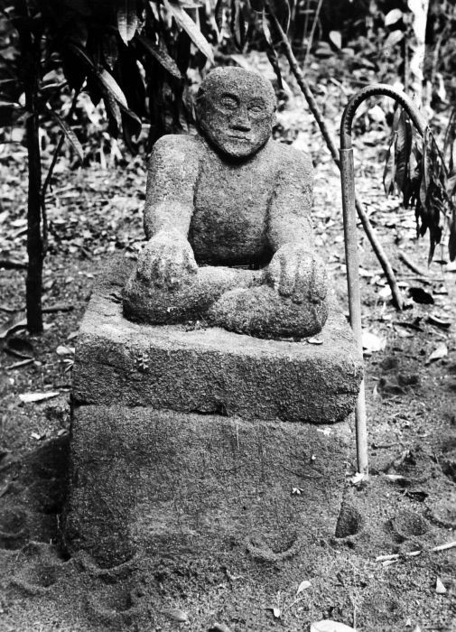 Repronegatief. Stenen beenderkist met resten van Toean Doriandjim te Nagori Dolog, Simalungun, Noord-Sumatra